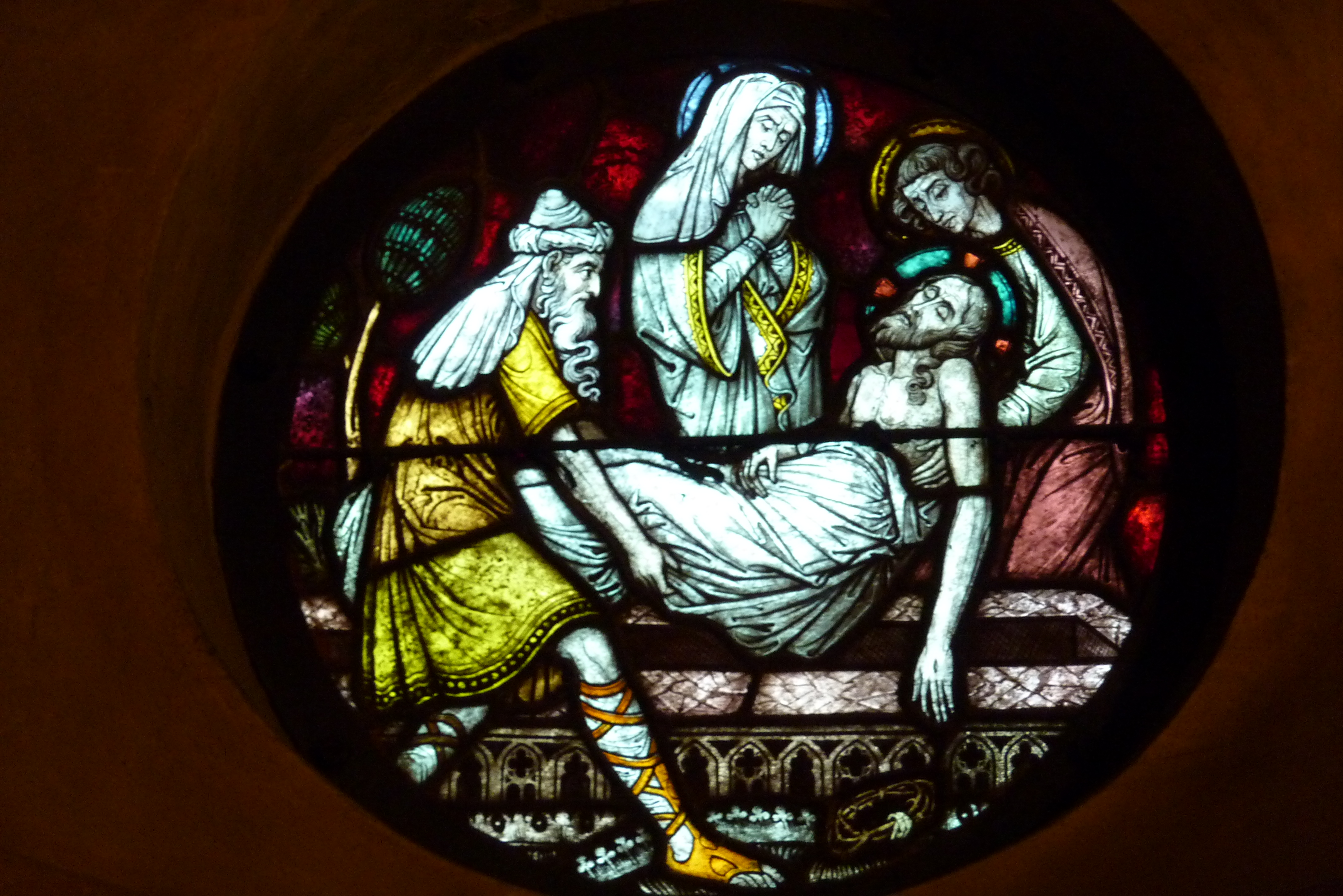 Markuskapelle in Altenberg, Ausschnitt eines Bleiglasfensters (ausgeführt um 1900 von der Glasmalerei Schneiders und Schmolz) "7 Schwerzen Mariens" (Fenster nIV), Darstellung: Grablegung Christi, hergestellt 1899/1900 von der Glasmalerei Schneiders & Schmolz in Köln (siehe Uwe Gast, Daniel Parello, Hartmut Scholz: Der Altenberger Dom (Monumente der Glasmalerei 2), Schnell & Steiner, Regensburg 2008, S. 83-89, ISBN 978-3-7954-1960-8)